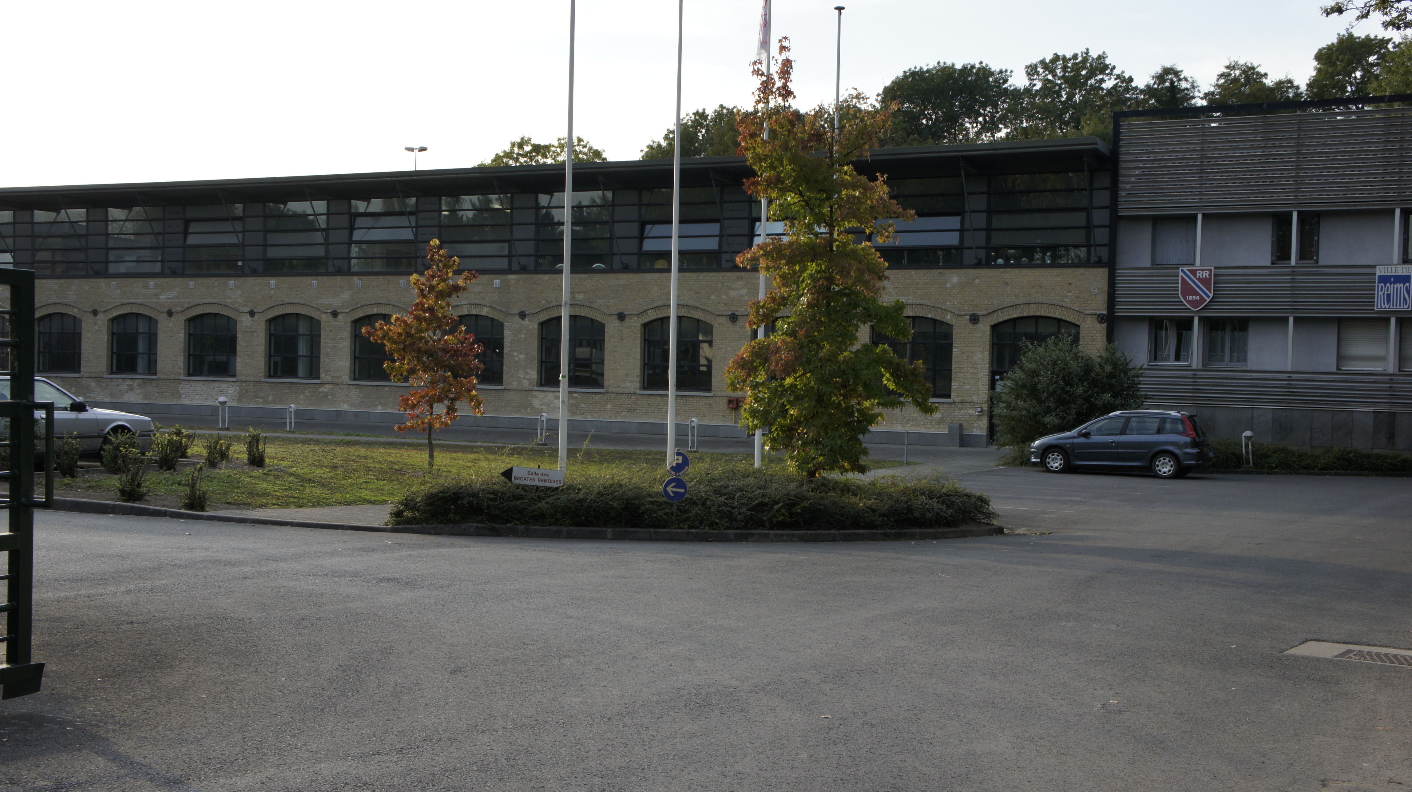 Le bâtiment des Régates Rémoise de Reims .